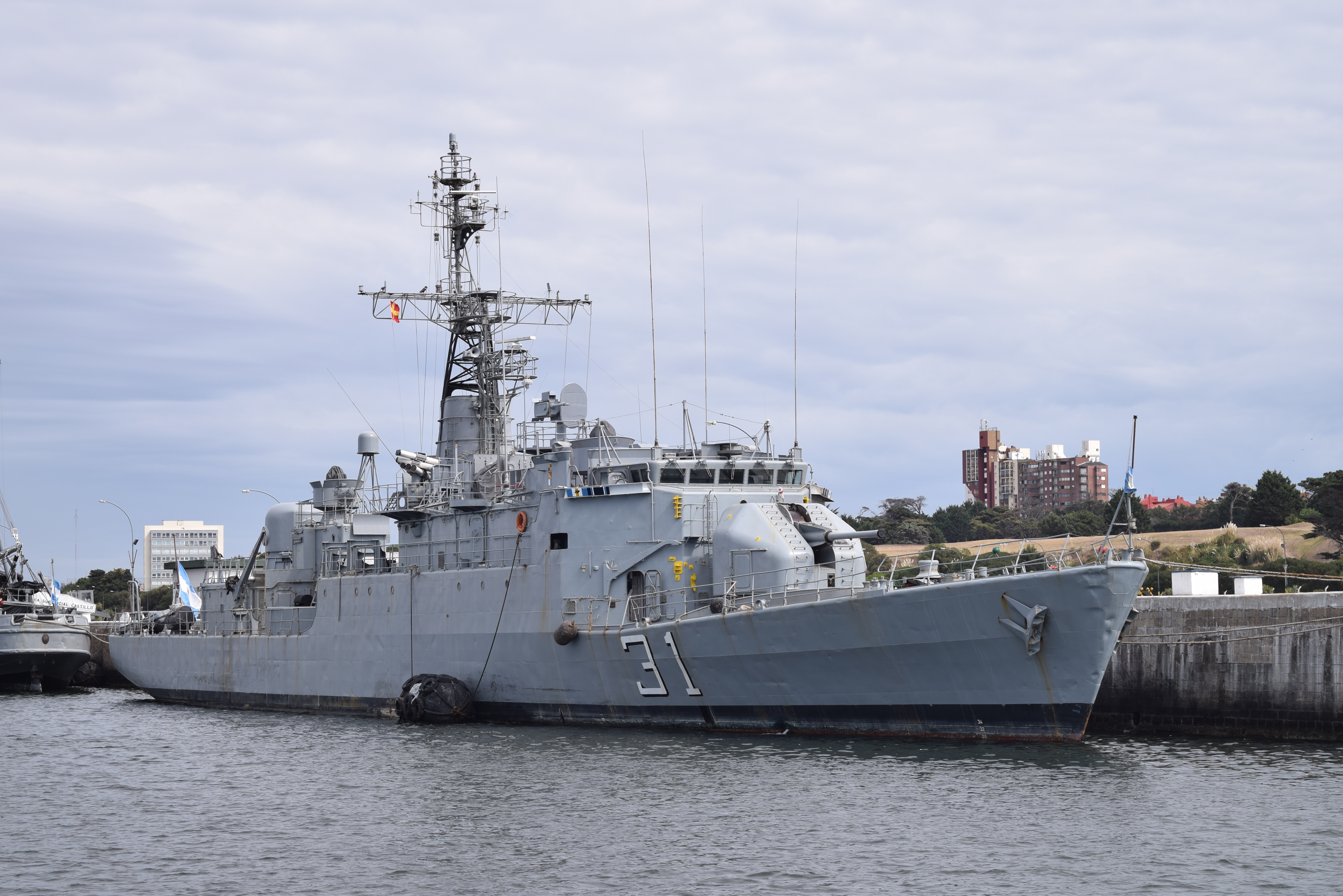 ARA Drummond (P-31)